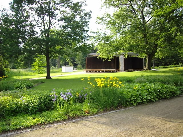 Sole-Inhalierpavillion (Gradierwerk/Saline) im Kurpark Bad Laer